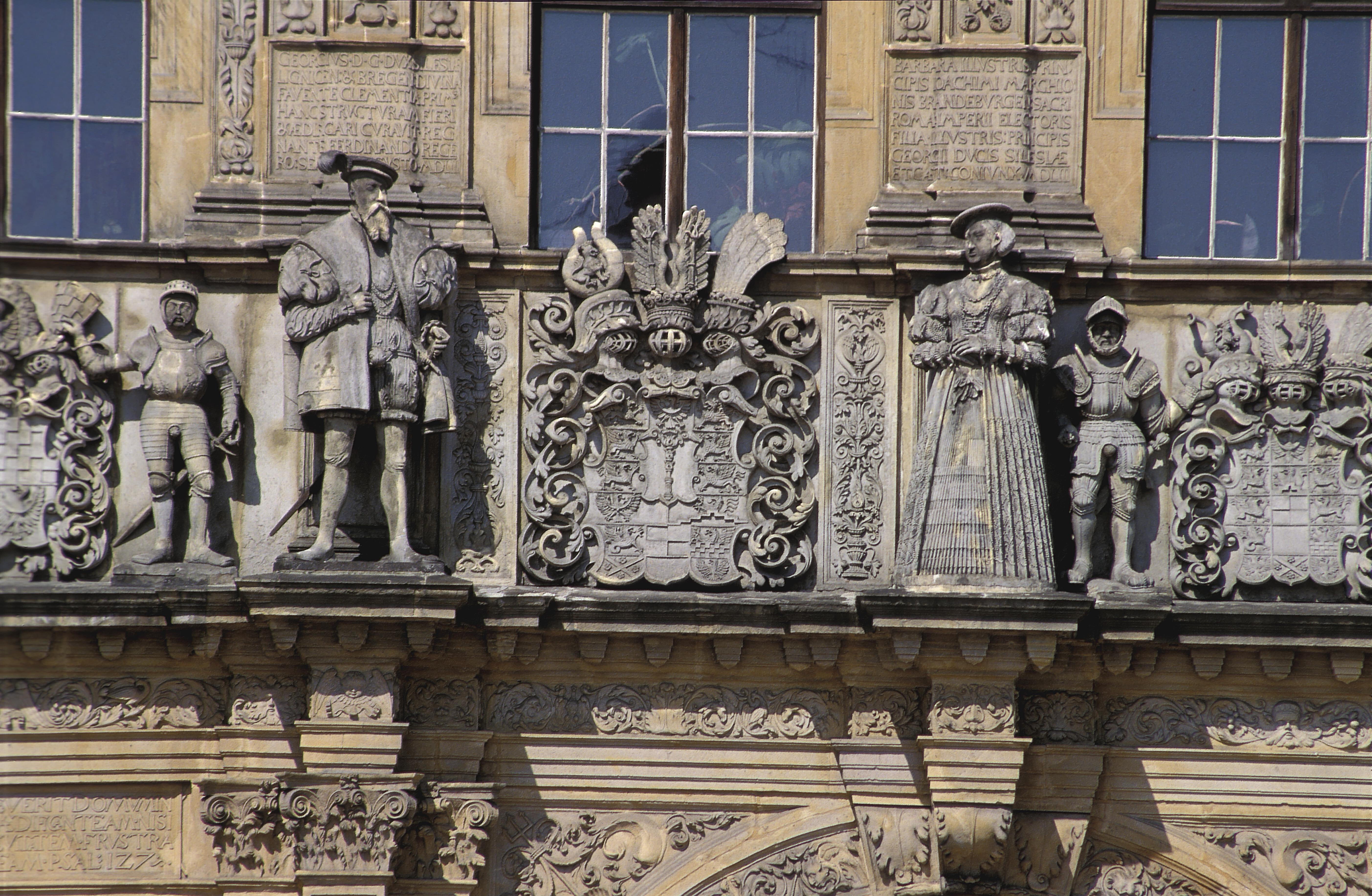 Poland, Brzeg Castle